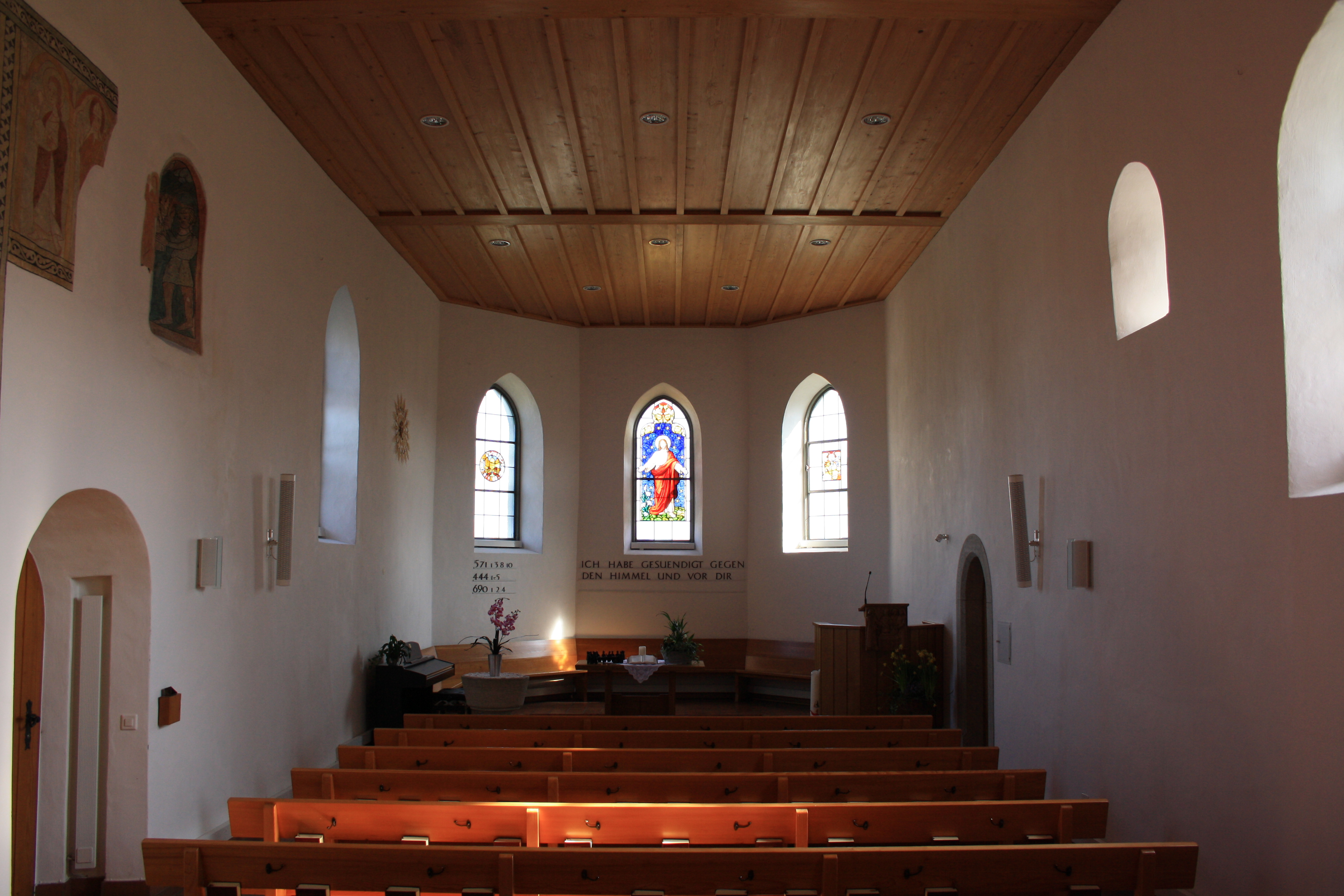 Kirchenschiff der reformierten Kirche Leutwil